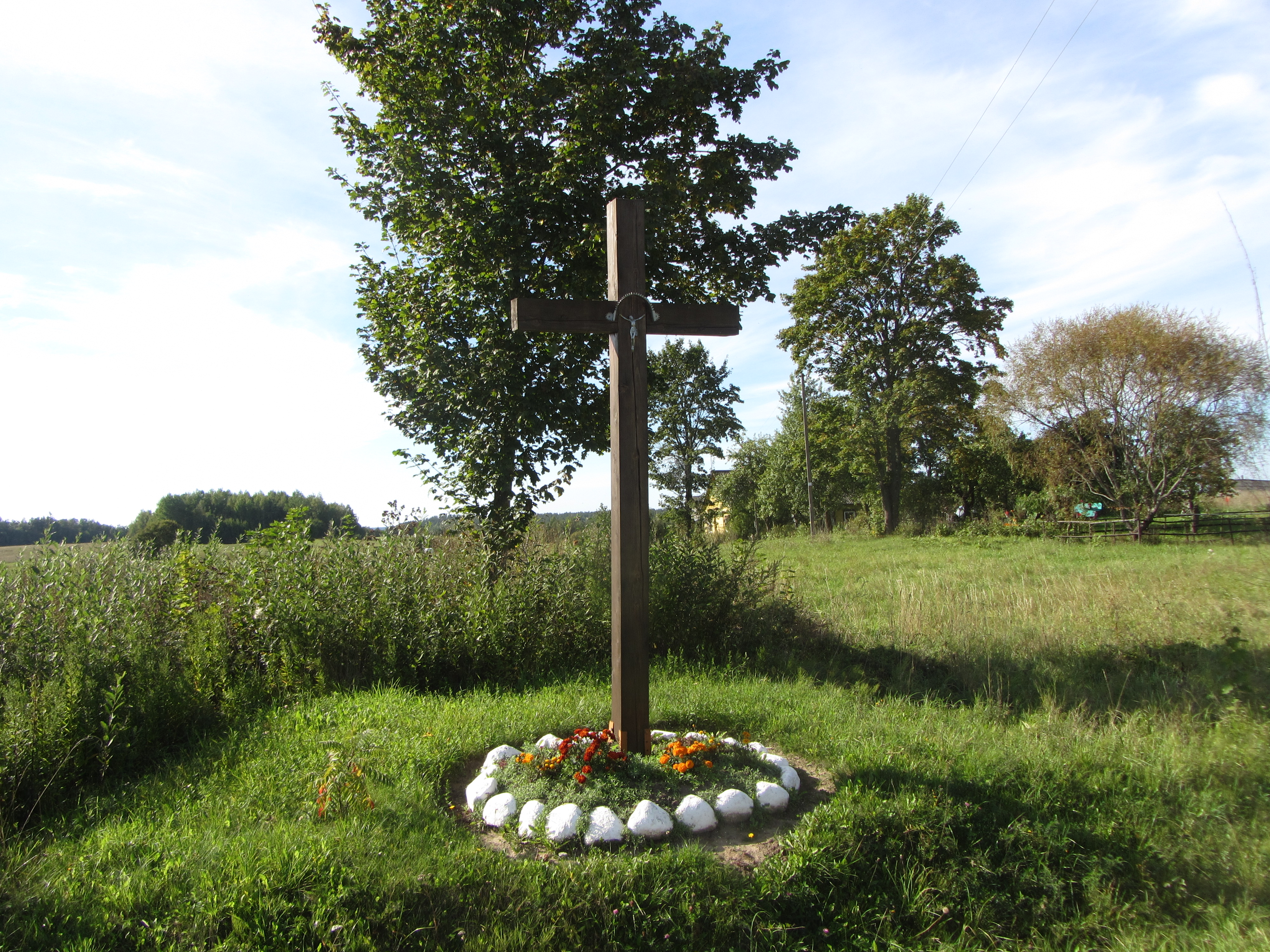 Kaneišiai, Lithuania